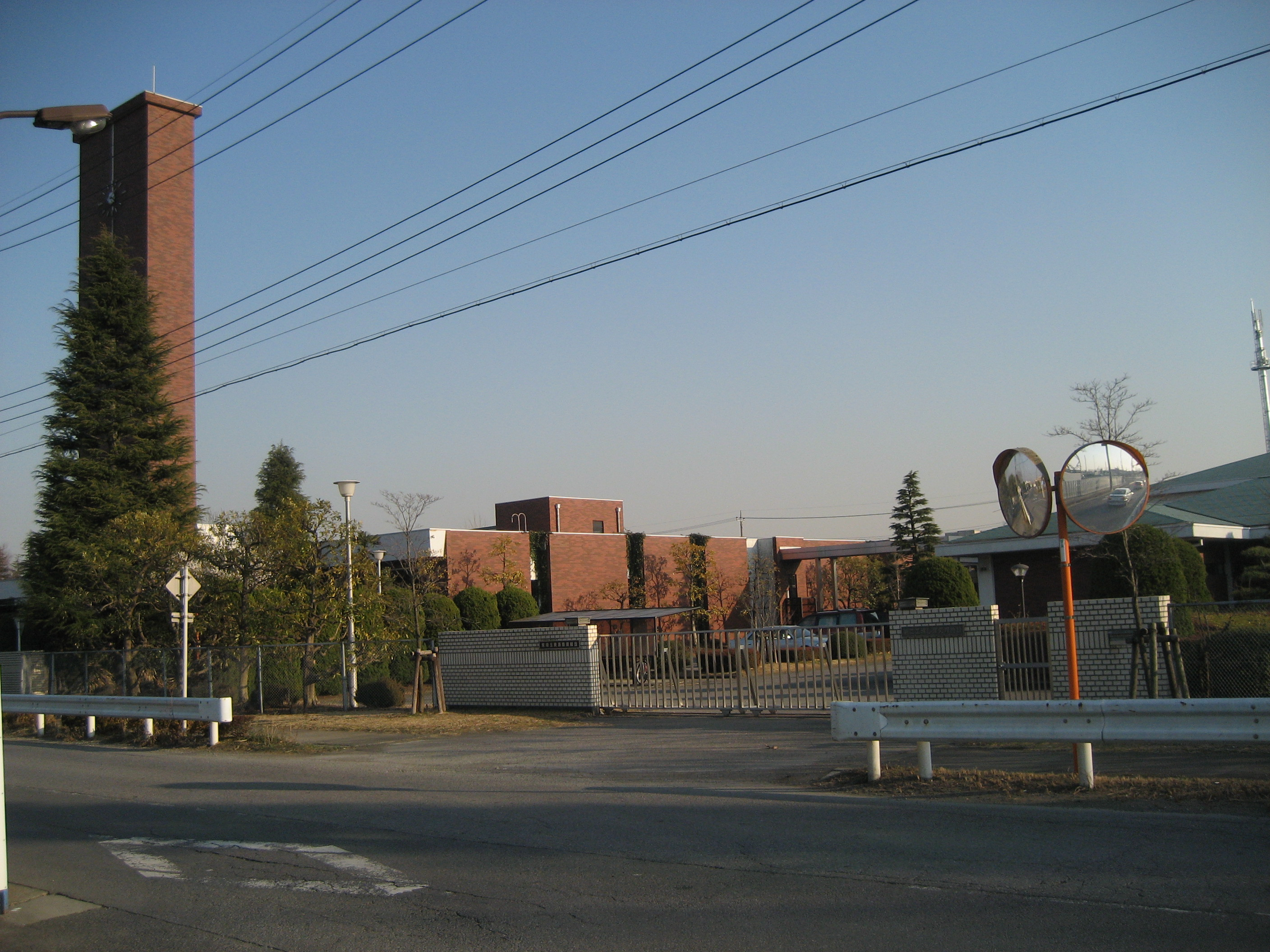 東埼玉資源環境組合第二工場し尿処理場